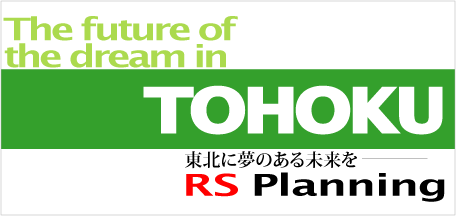 東北に夢のある未来を